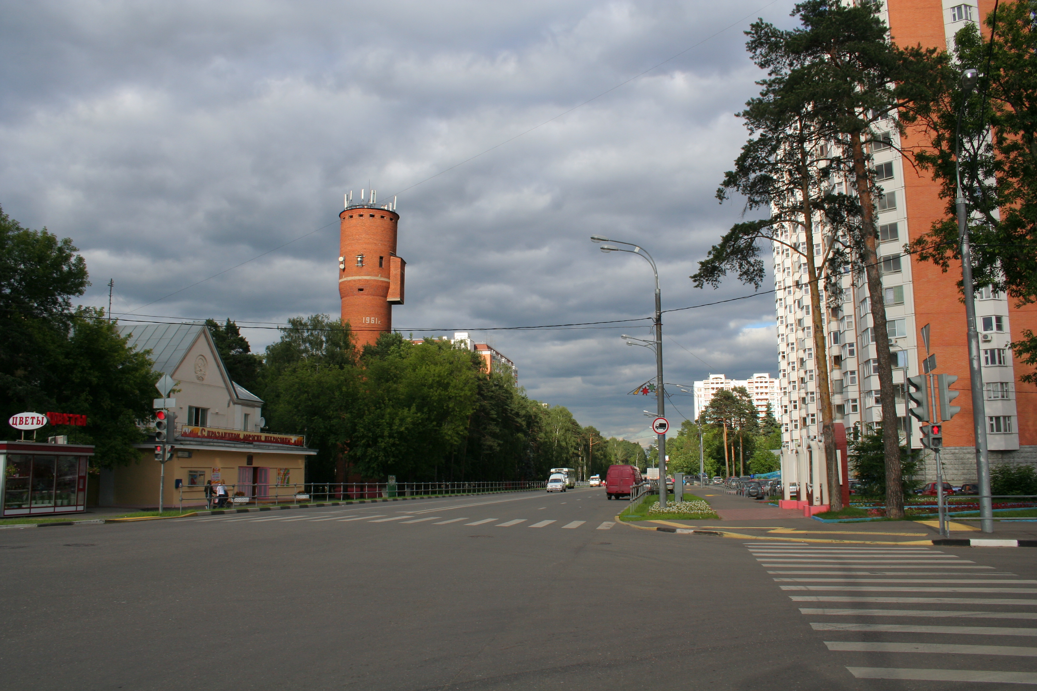 Trabantensiedlung Nekrassowka in Moskau. Eine der Straßen. Kulturhaus, Wasserturm (?), Wohnblock.